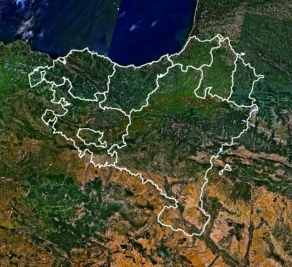 Euskal Herriko mapa Landsat irudi baten gainean